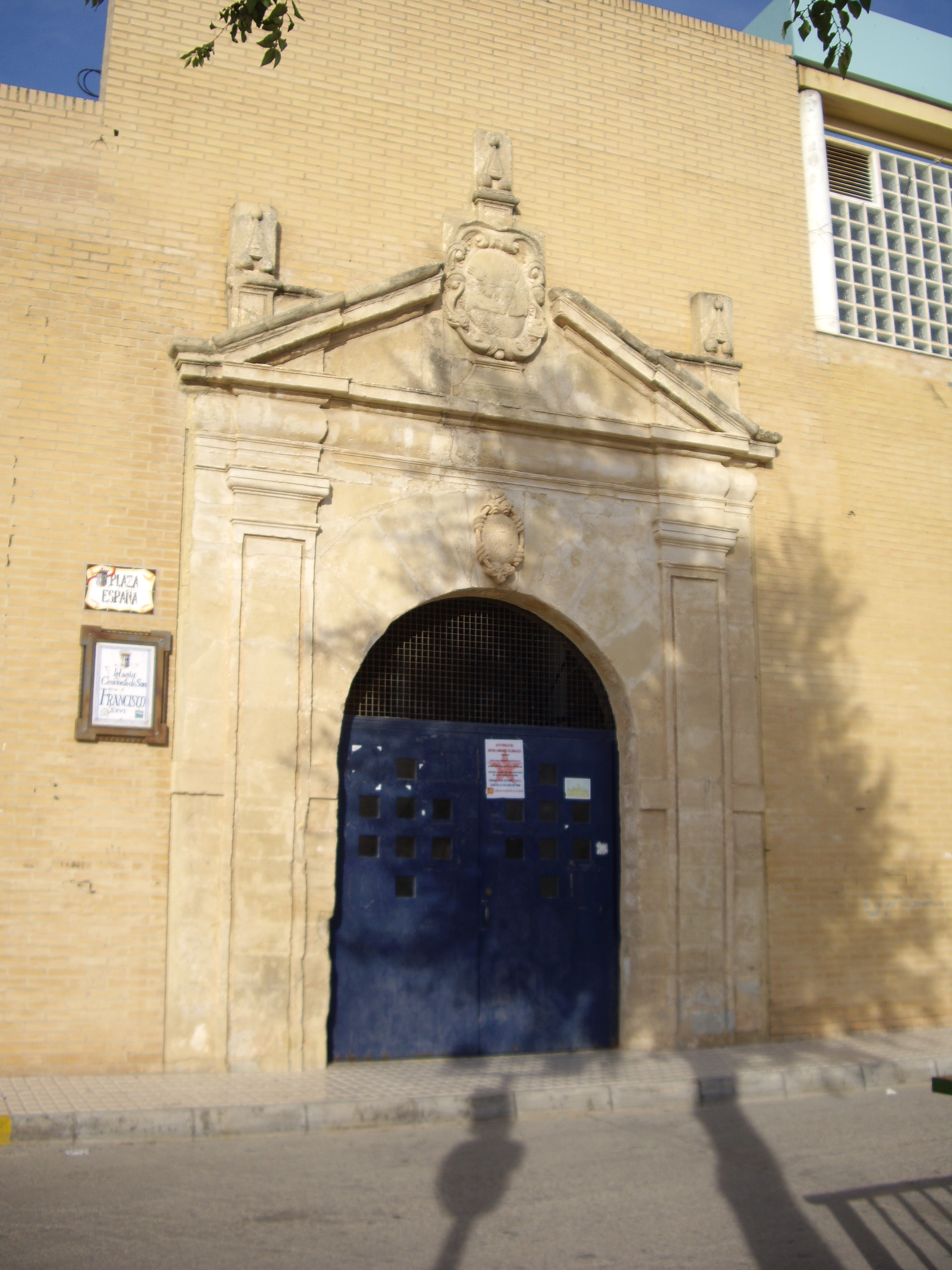 Portada del Convento de San Francisco en Teba - Málaga - España